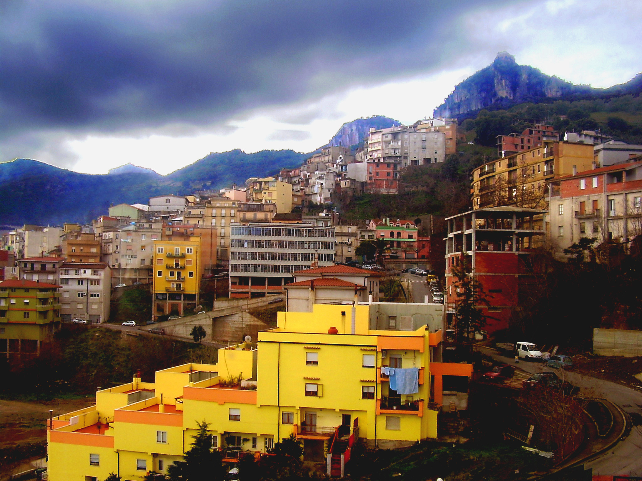 Panorama del paese visto da "Su Forreddu"